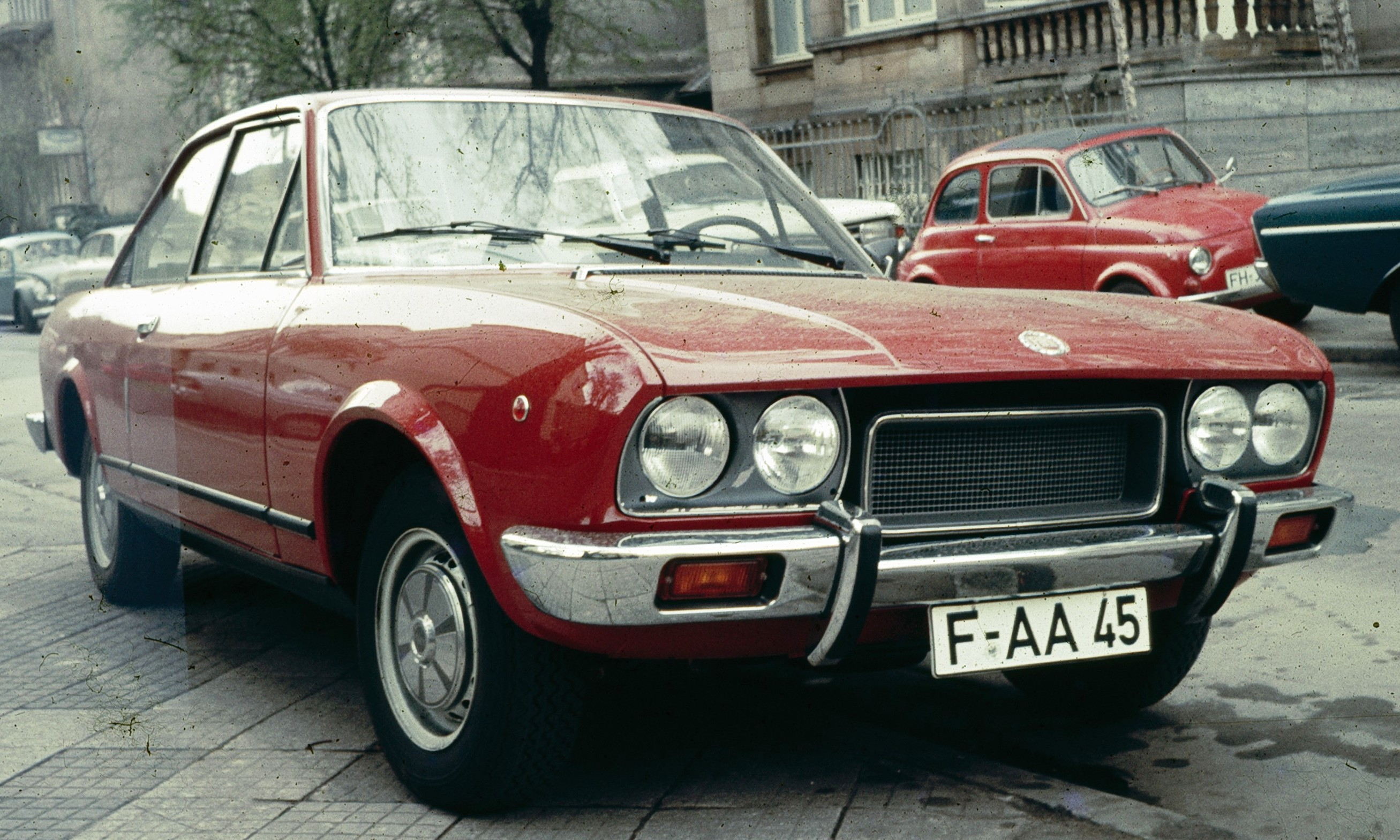 Fiat 124 Sport Coupé 3ª serie (1972-1975)